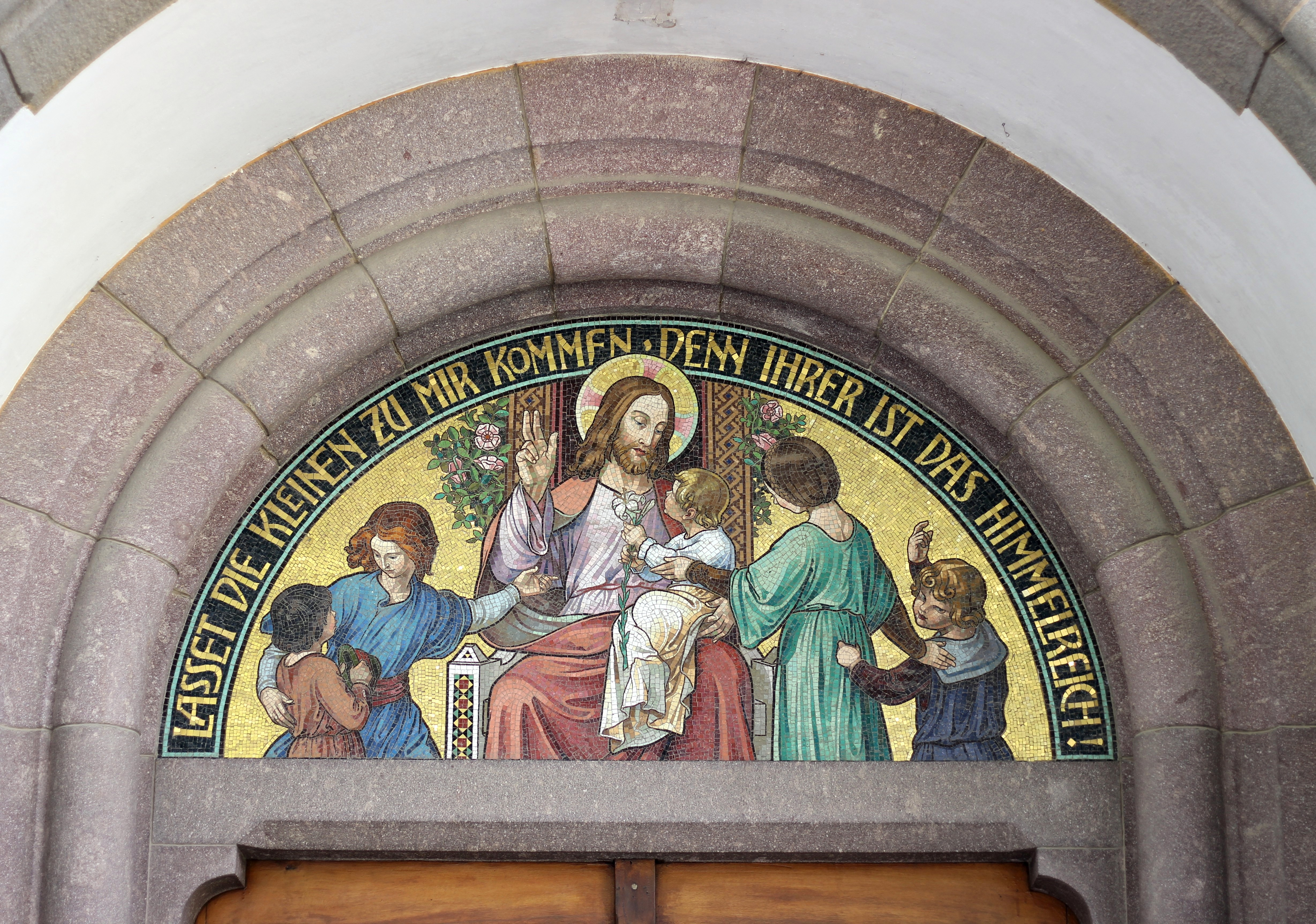 Mosaik am Eingang der Herz-Jesu-Kirche in Meran, Josef Pfefferle